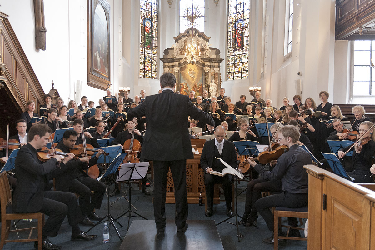 Københavns Bachkor (og orkester) opfører Matthæuspassionen i Helligåndskirken, København, 6/4-12. Foto af Kim Matthäi Leland